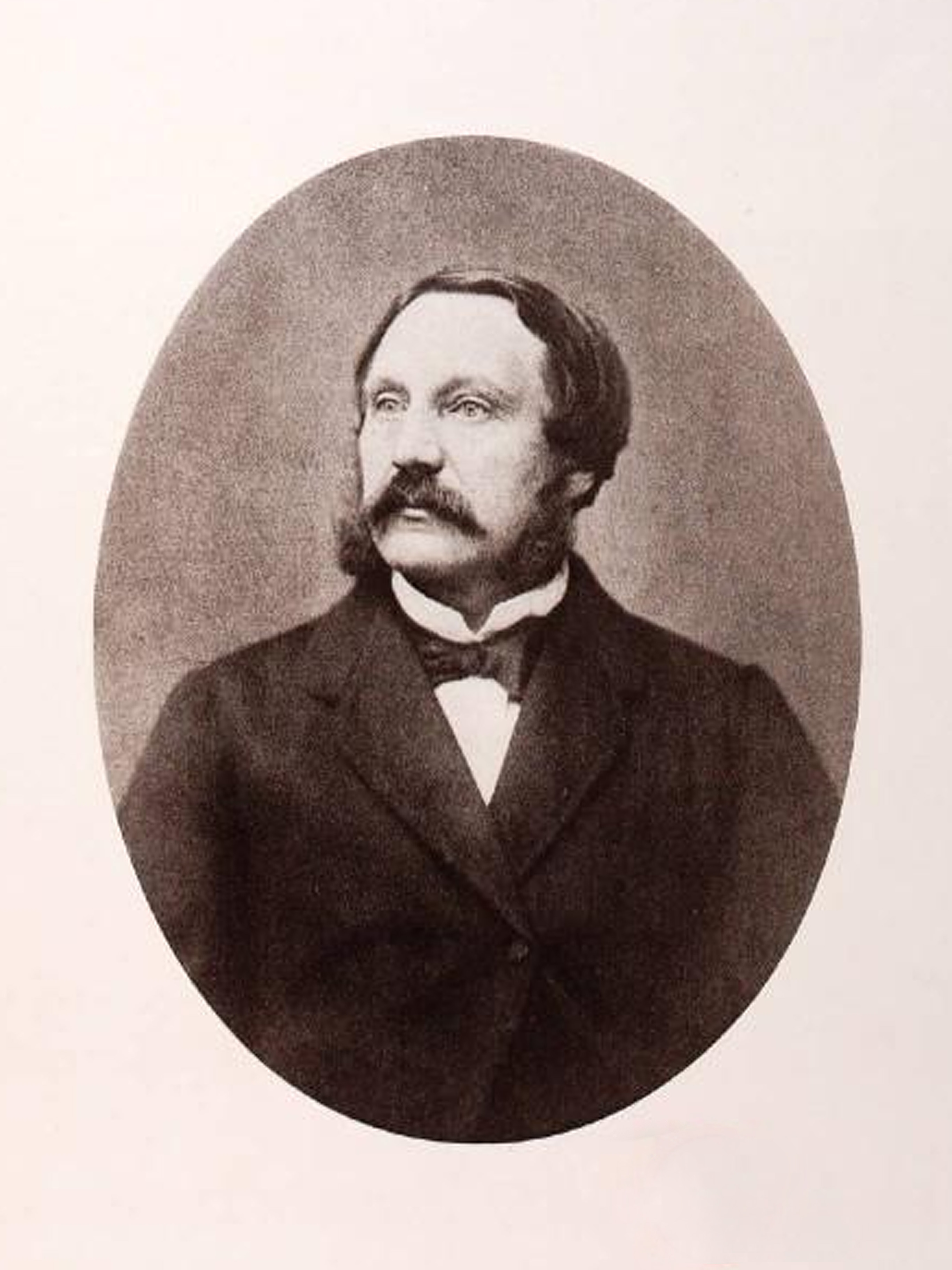 Lucien Dautresme